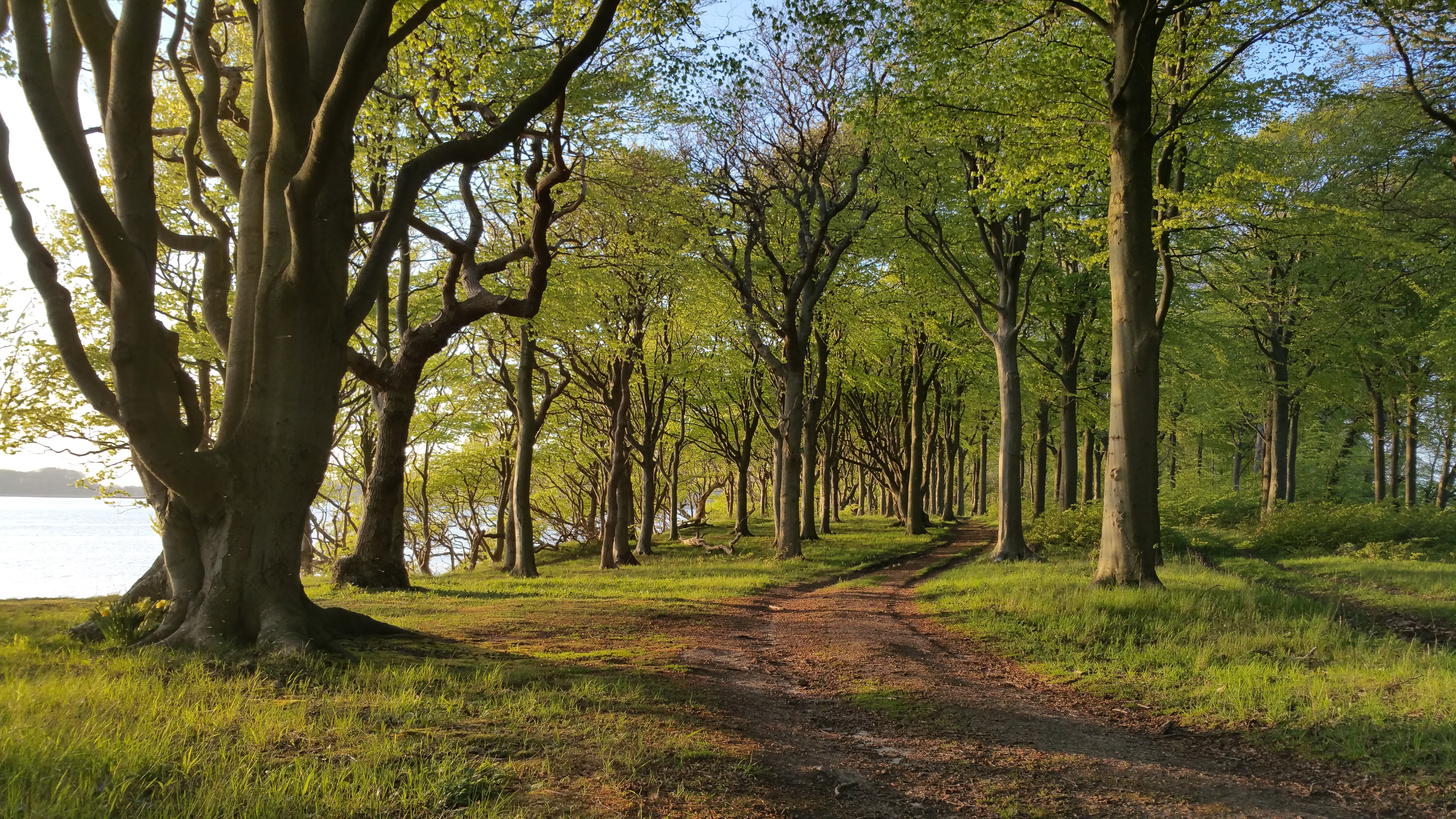 Vejlø Skov